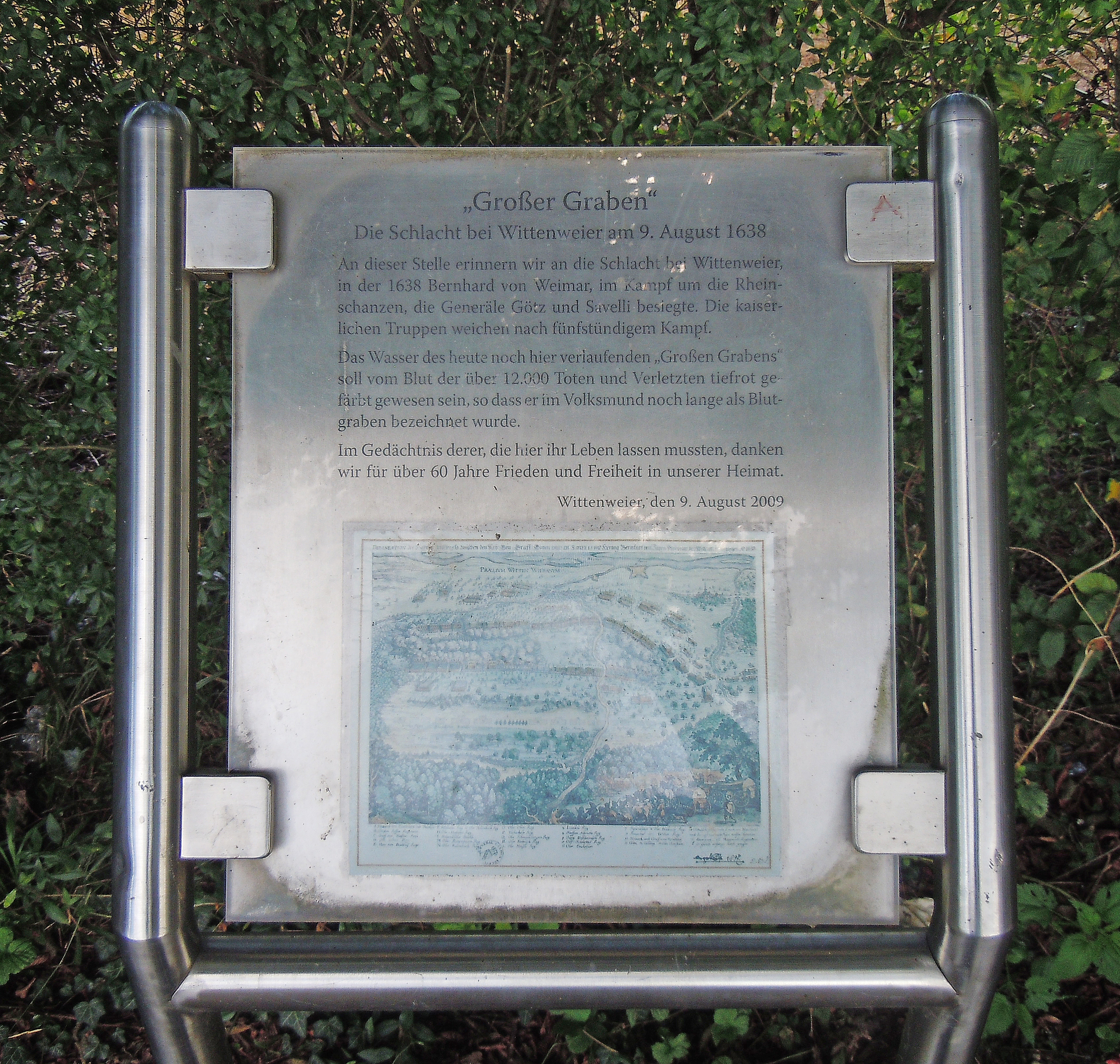 Gedenktafel errichtet 2009